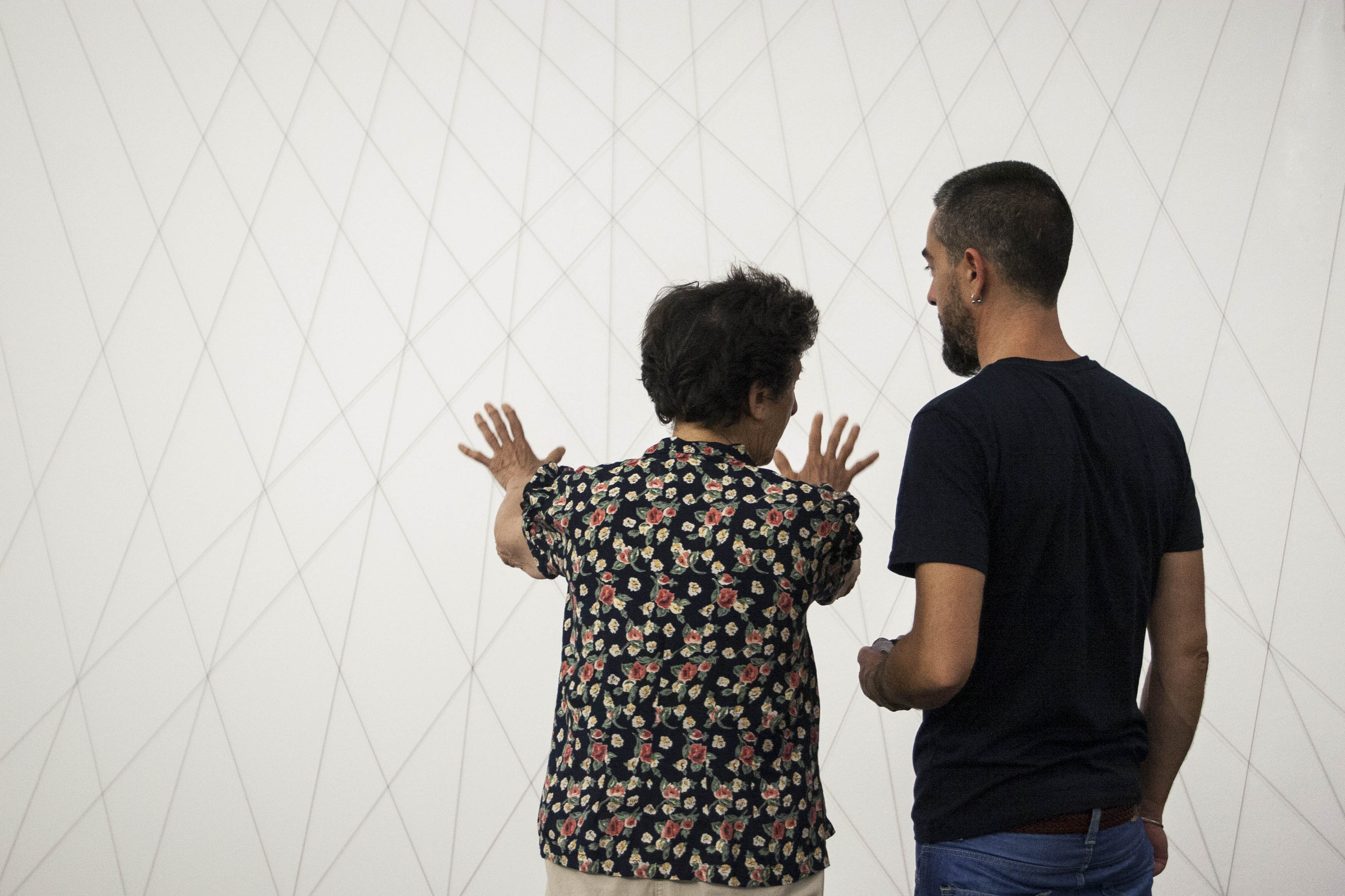 L’artista dóna instruccions per muntar adequadament la peça ‘Proyecto espacial #7’ (1975), que es podrà veure a partir del 18 de juny a l’exposició de la Col·lecció ‘Desitjos i necessitats’. Gemma Planell / MACBA, 2015